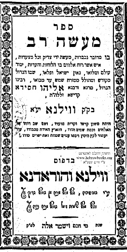 כריכת הספר מעשה רב בדפוס וילנא